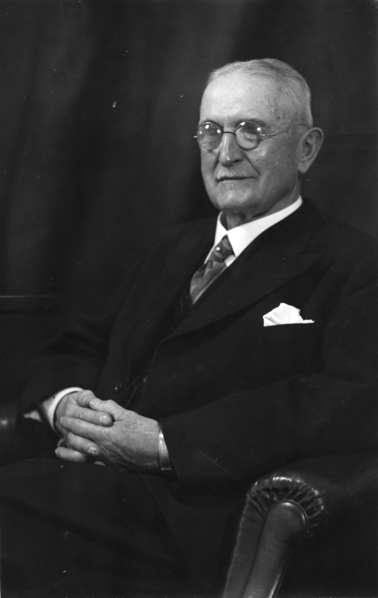 Professor Leonard Axel Jägerskiöld, 75 år